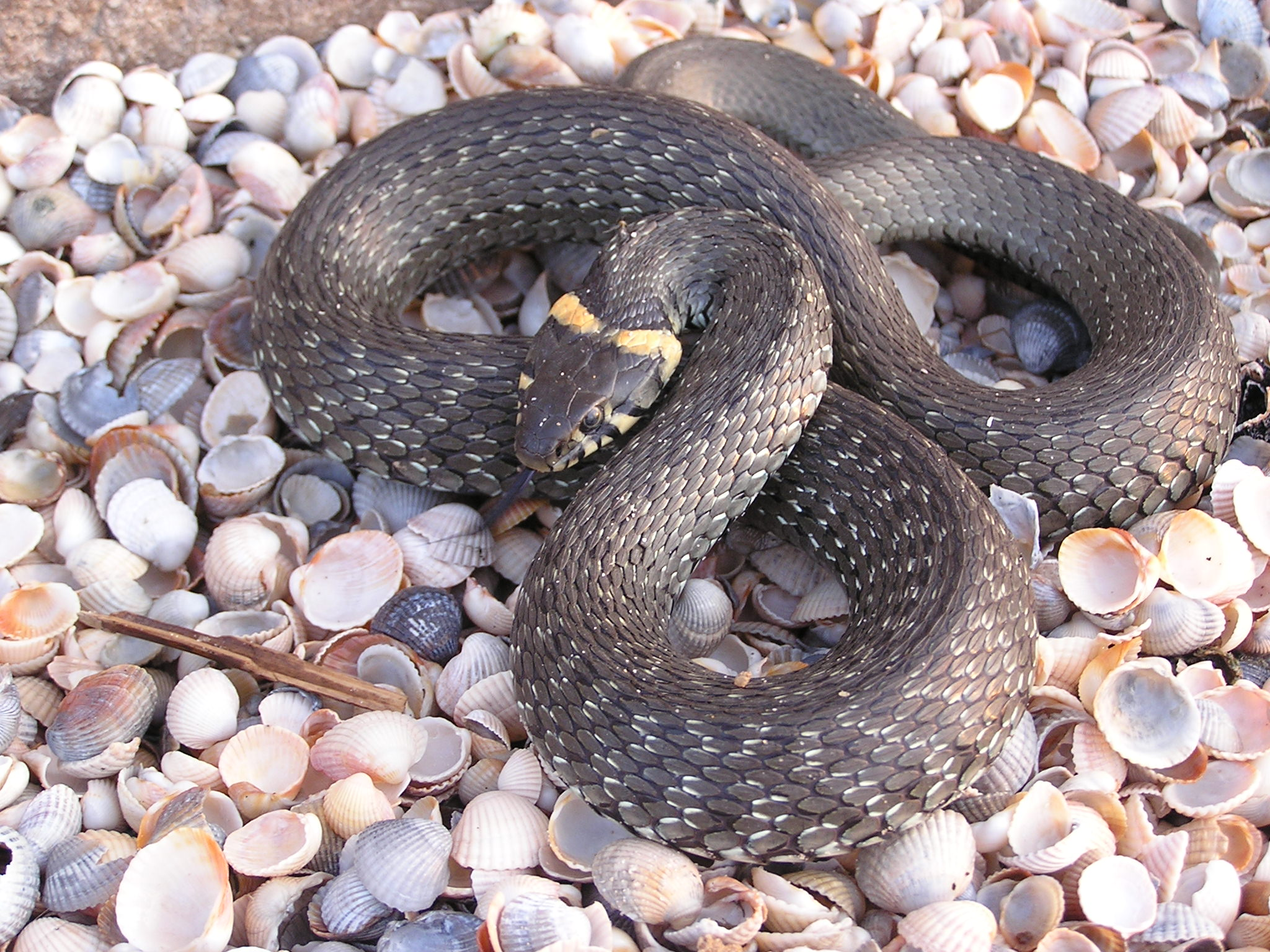 Natrix natrix